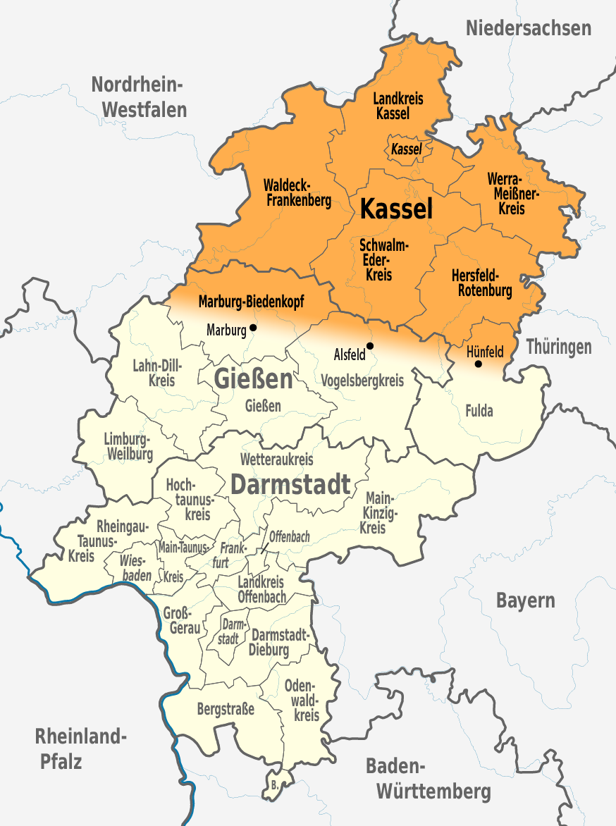 Karte mit der Abgrenzung von Nordhessen gemäß einem Vorschlag eines 1973 in Kassel abgehaltenen Geographentag. Dessen „Festschrift“ erschien unter dem Titel Beiträge zur Landeskunde von Nordhessen. Darin wurde unter Berücksichtigung von kulturräumlichen Gegebenheiten als ungefähre südliche Abgrenzung eine Linie Marburg (Landkreis Marburg-Biedenkopf) – Alsfeld (Vogelsbergkreis) – Hünfeld (Landkreis Fulda und damit die nördliche Vorderrhön) vorgeschlagen.